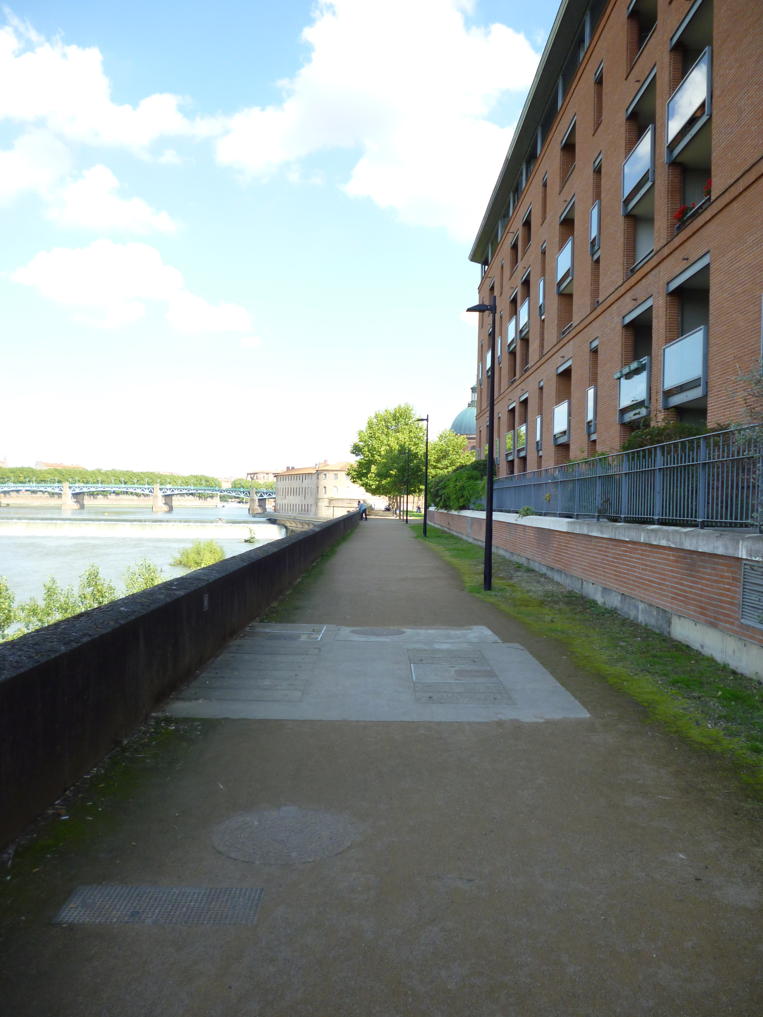 Allées du jardin public Raymond VI